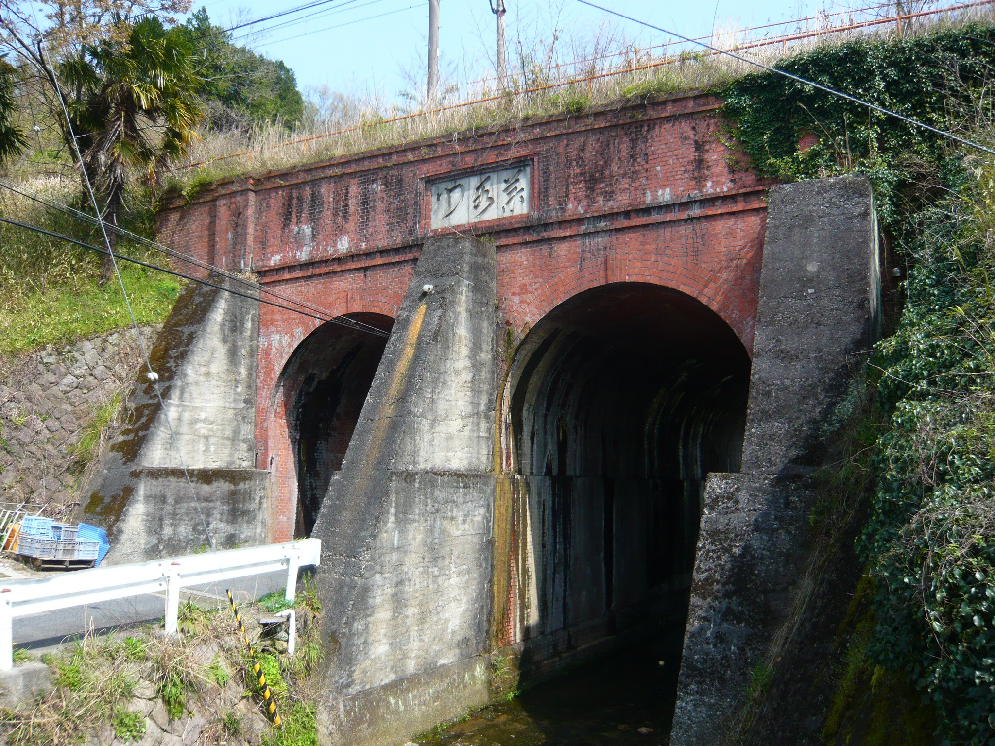 薬水門 Kusurimizu-mon 2010.4.11